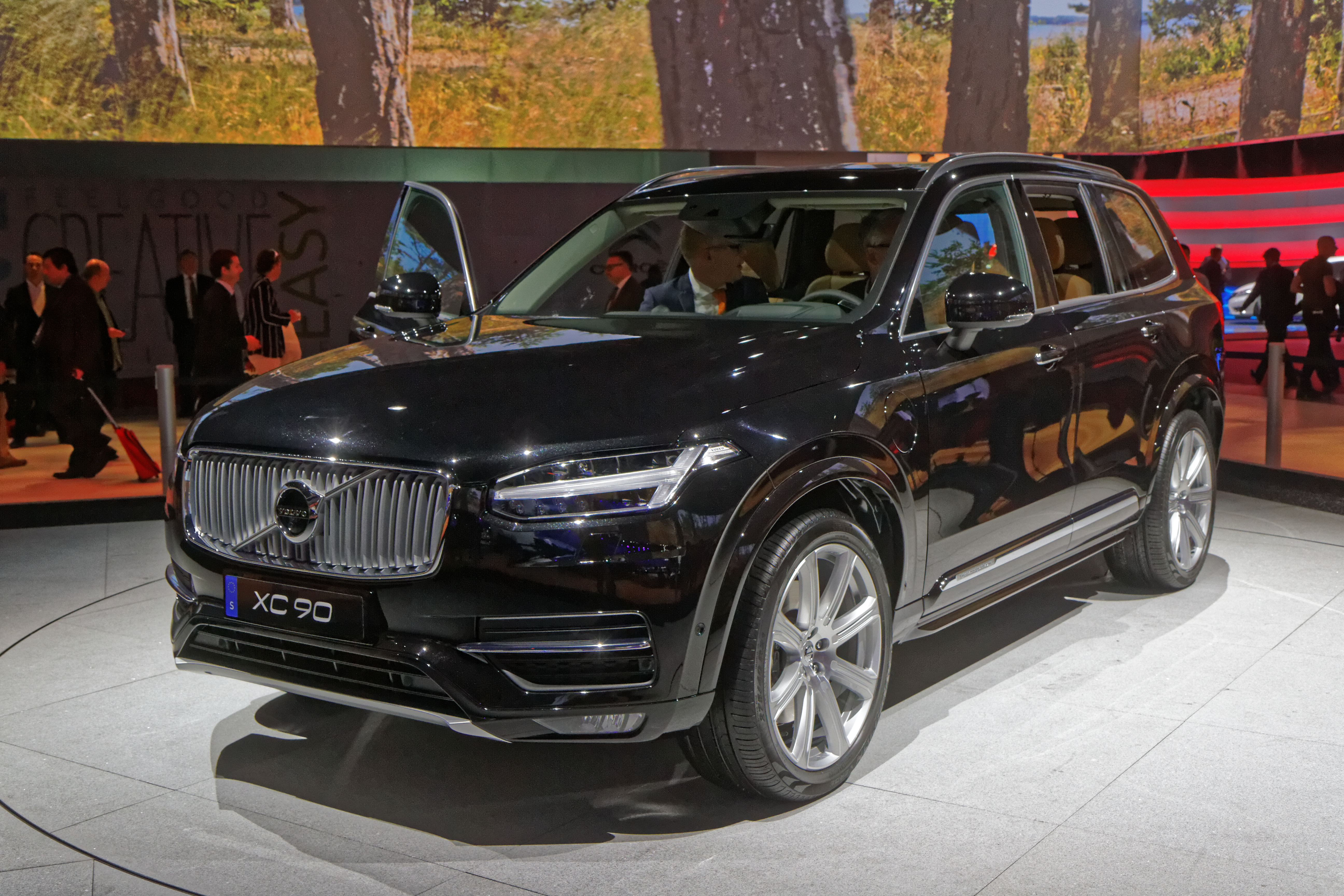 Une Volvo XC 90 présentée lors du mondial de l'automobile de Paris 2014.